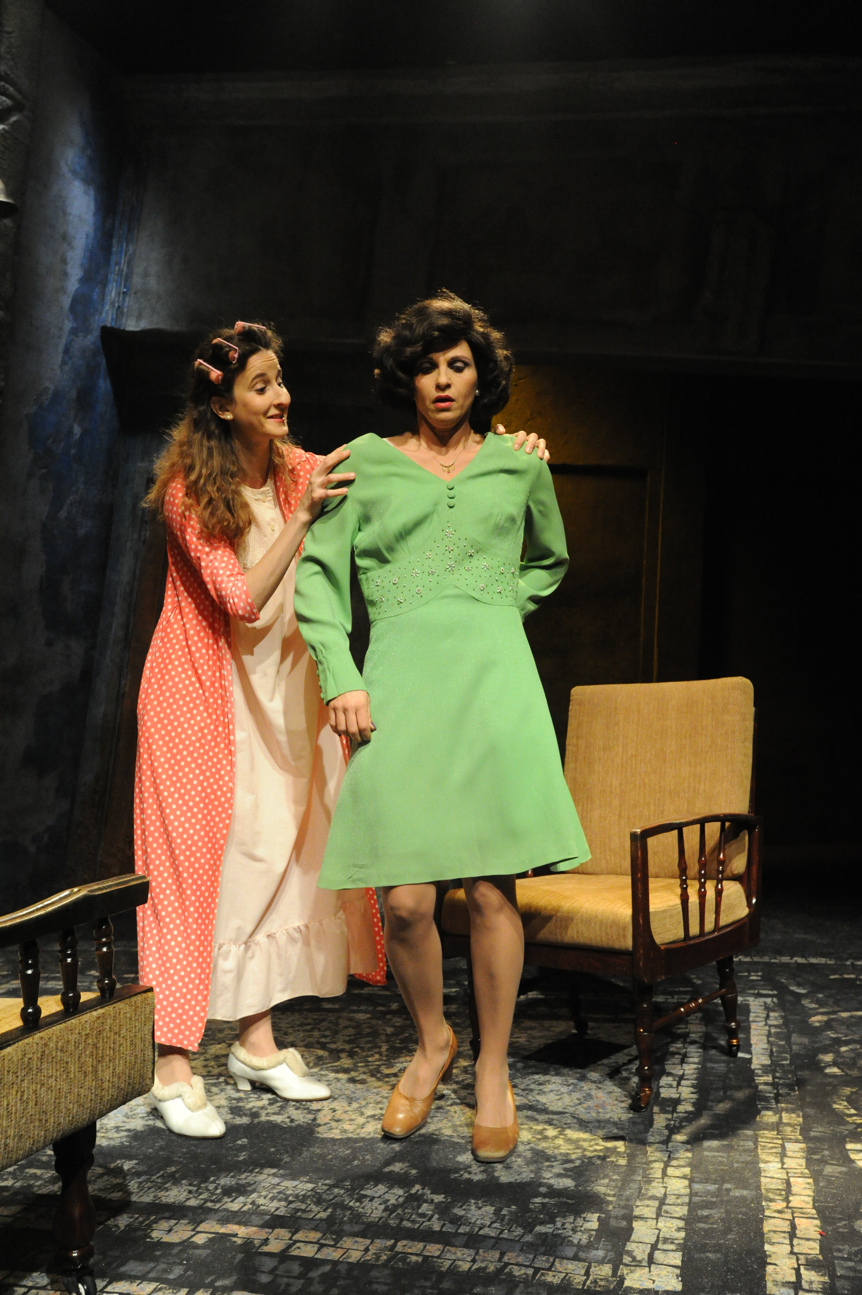 כרמית מסילתי-קפלן ואורית גל בהצגה "חוקר פרטי", מאת ובבימויו של מיקי גורביץ', תיאטרון החאן, 2012